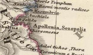 Pontus Euxinus et quae ei adjacent. (with) Bosporus Thracius. (with) Bosporus Cimmerius. (with) Chersonesus Heracle. Corr. Menke 1861. Gothae: Justhus Perthes. Spruner-Menke atlas antiquus. (1865)